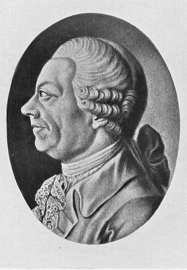 Friedrich Gottlieb Klopstock(1724-1803). Schabkunstblatt von J.E.Haid. Der berühmte Dichter des "Messias", vom jungen Goethe hochverehrte, besuchte ihn Ende September 1774 am Hirschgraben und nahm vorgelesene Faustszenen gnädig auf. Sein Eingreifen in Weimarer Verhältnisse (1776) führte zur Entfremdung